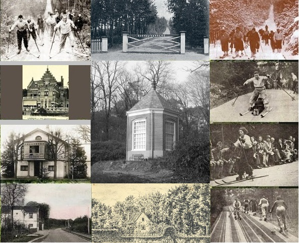 Collage diverse historische foto's Darthuizerberg & omgeving. Inclusief kuunstskibaan Leeersum